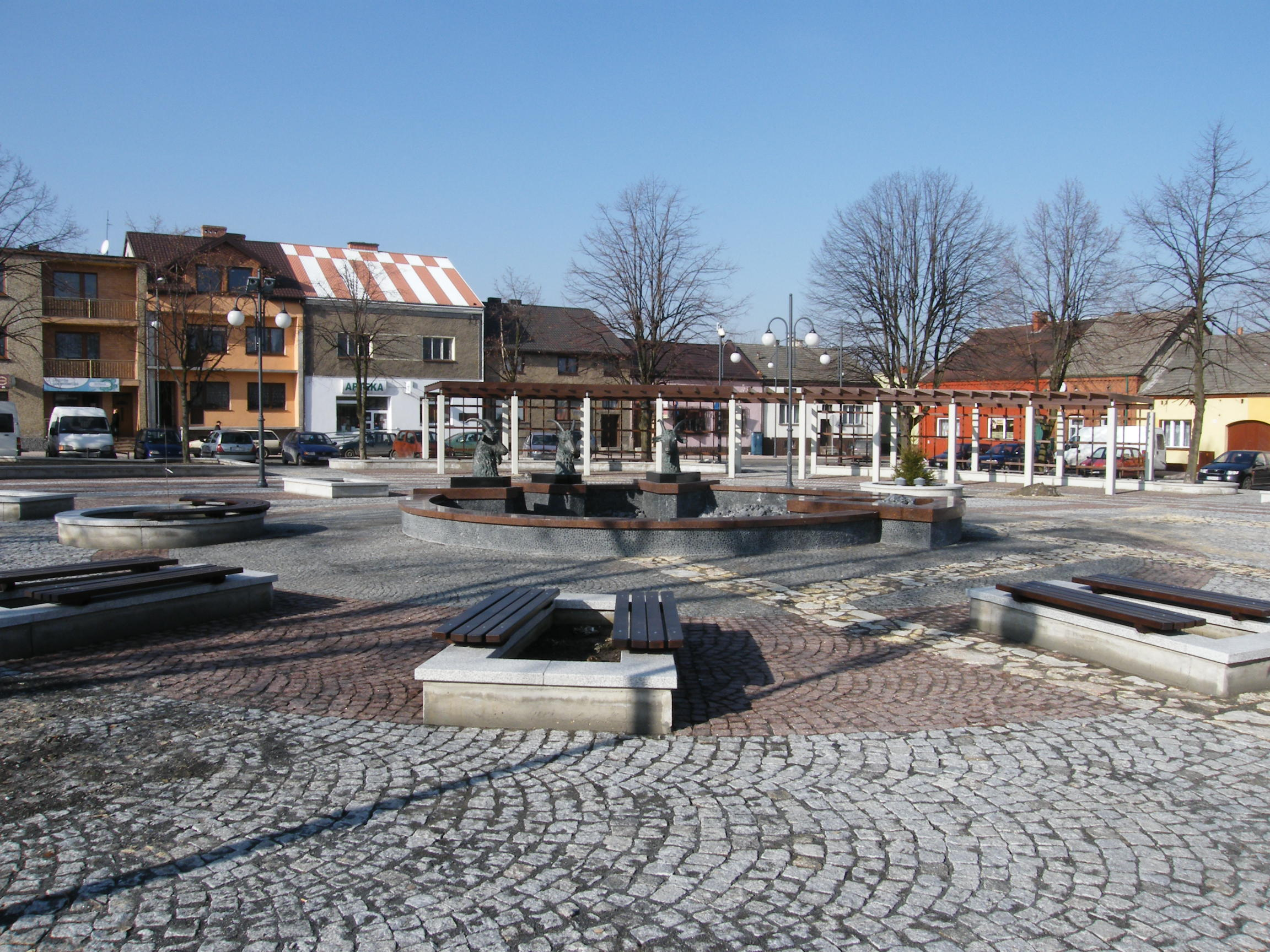 Rynek w Koziegłowach. Widoczna fontanna z głowami kozłów.